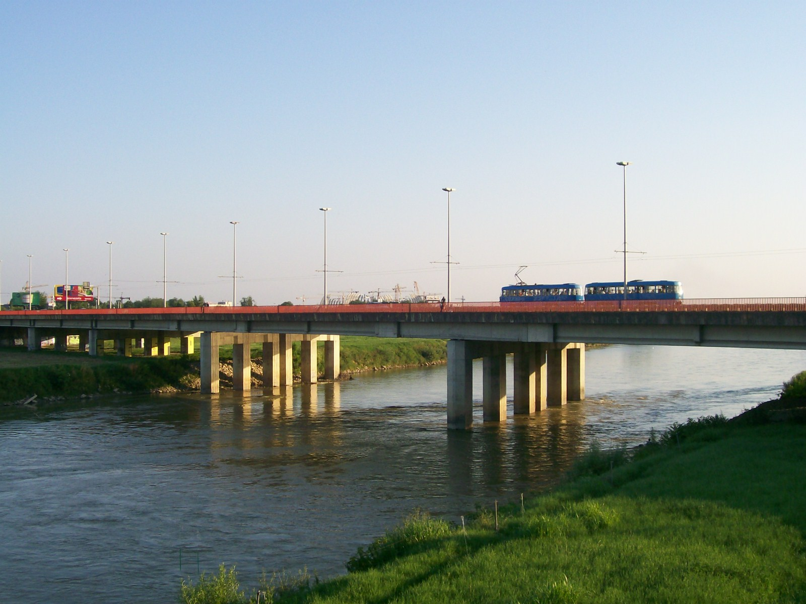 Jadranski most preko Save u Zagebu